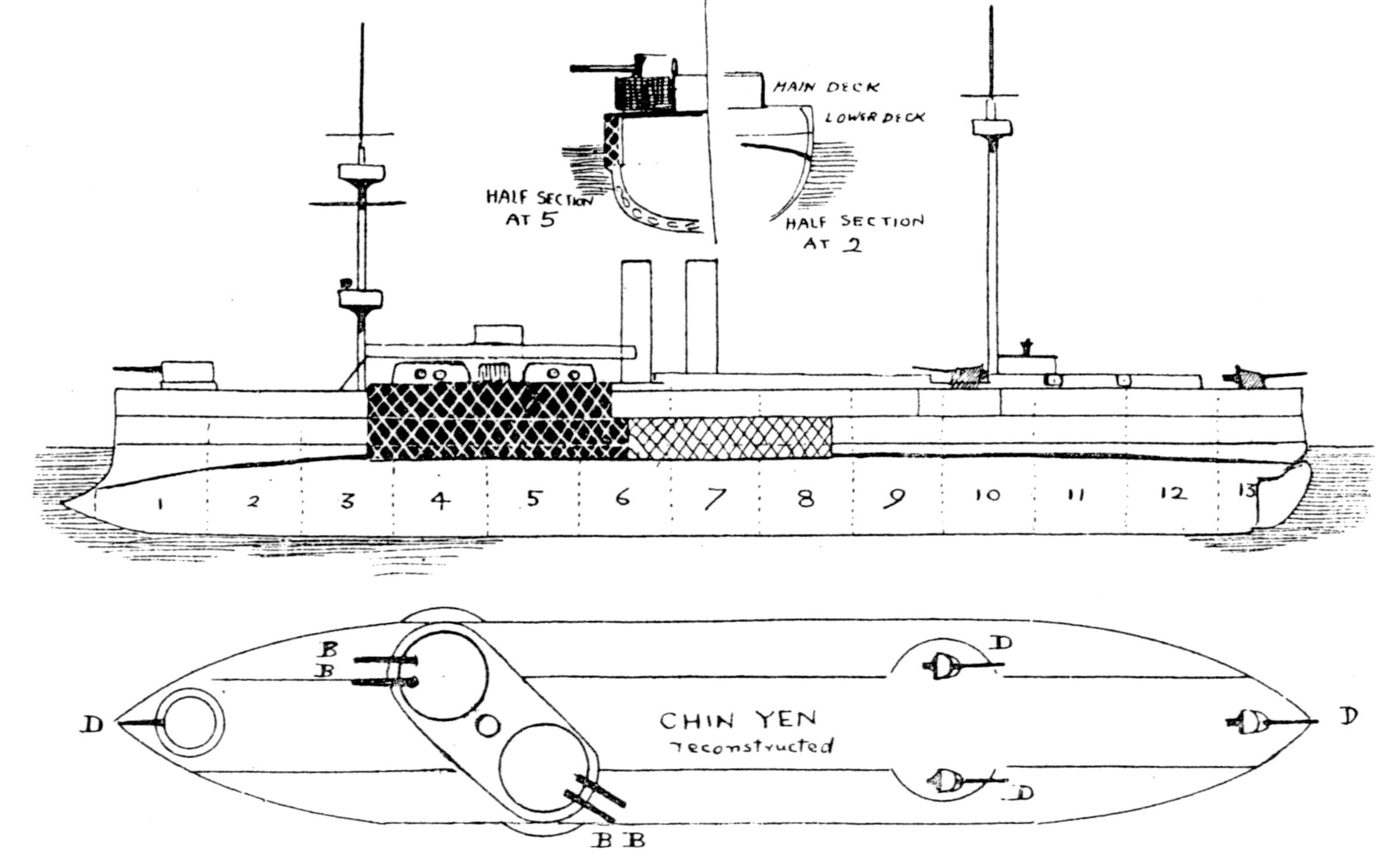 日本の戦艦「鎮遠」